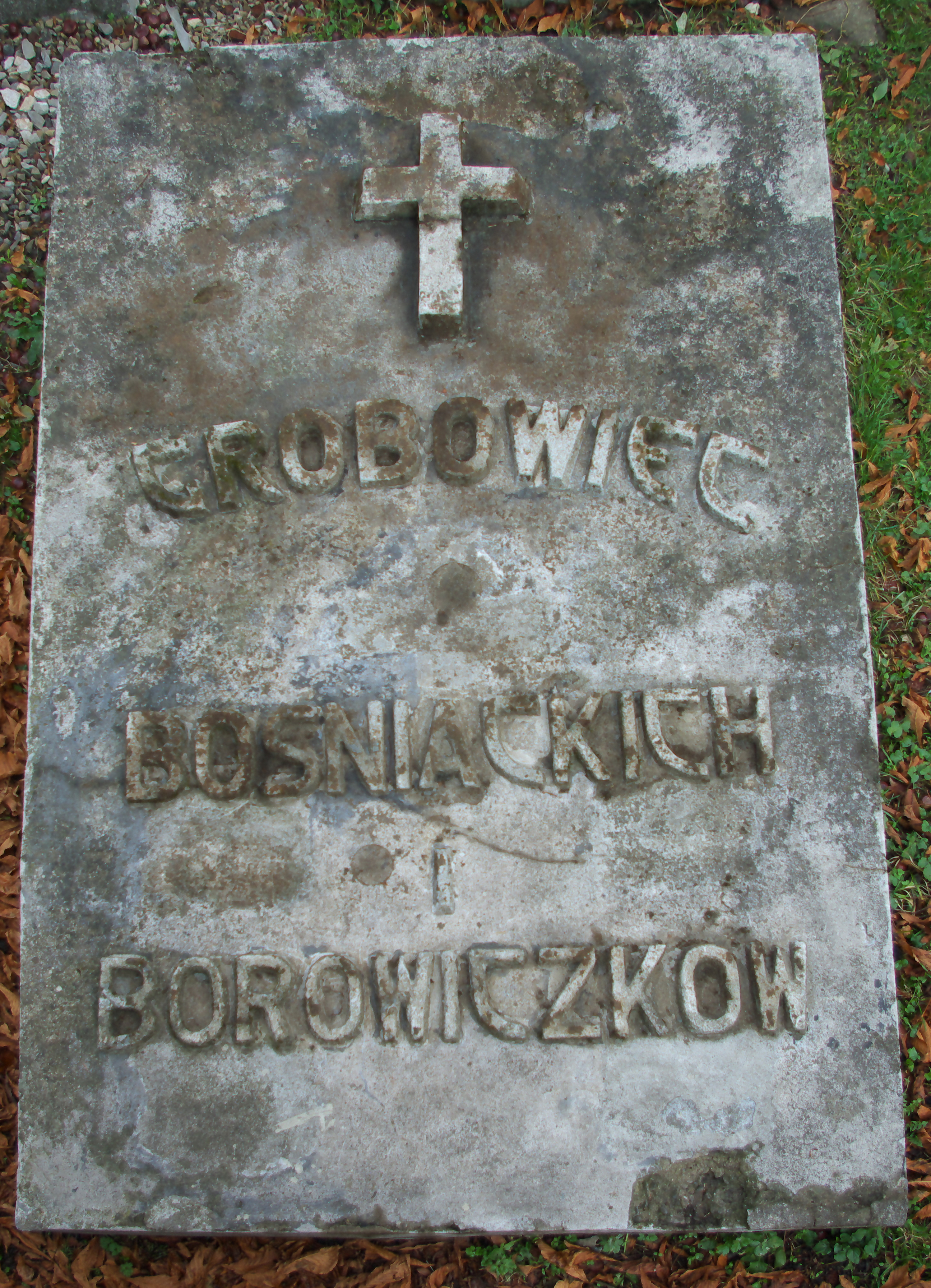 Nagrobek rodziny Bośniackich i Borowiczków na Cmentarzu Centralnym w Sanoku.